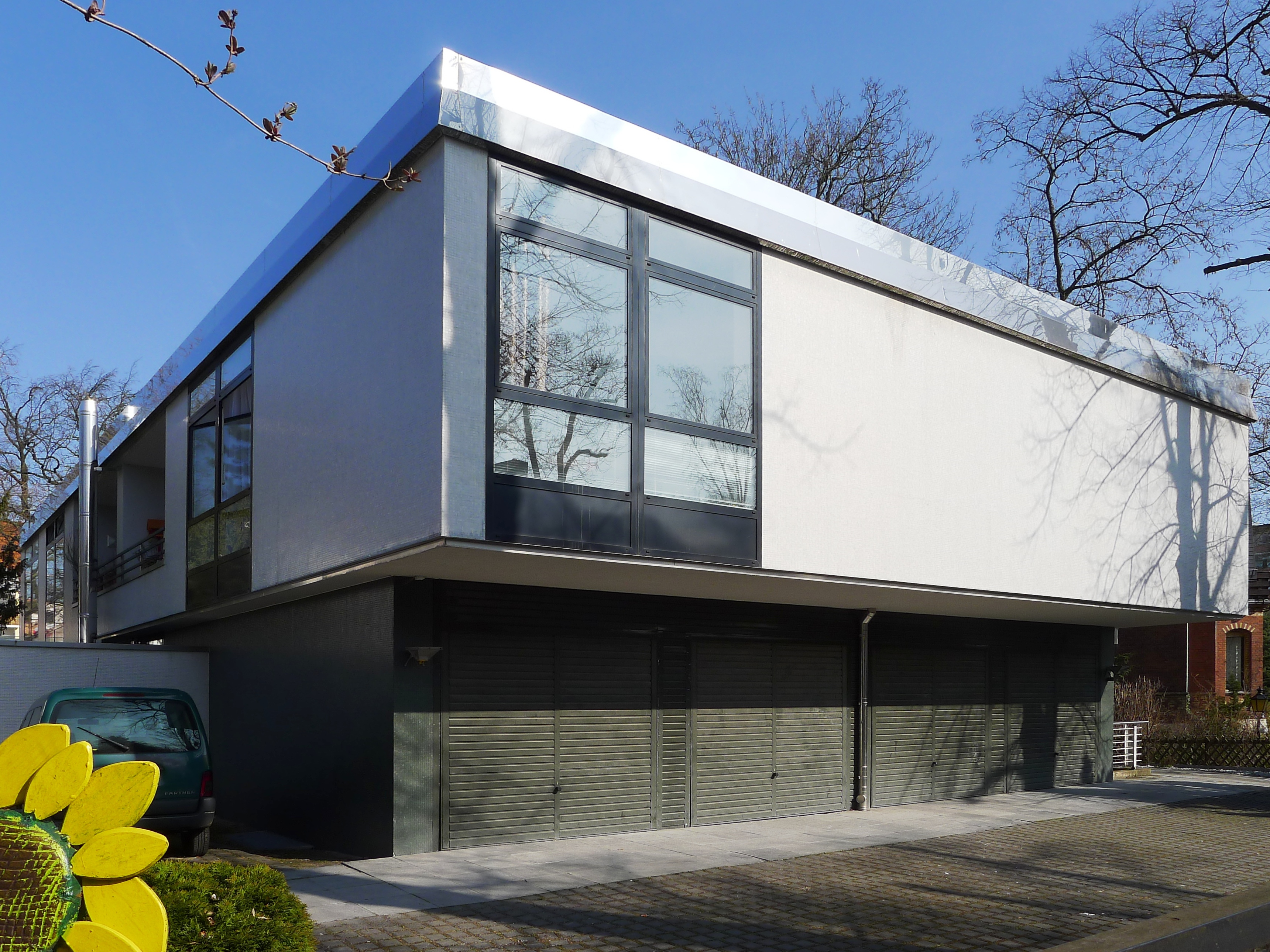 Wohnhaus